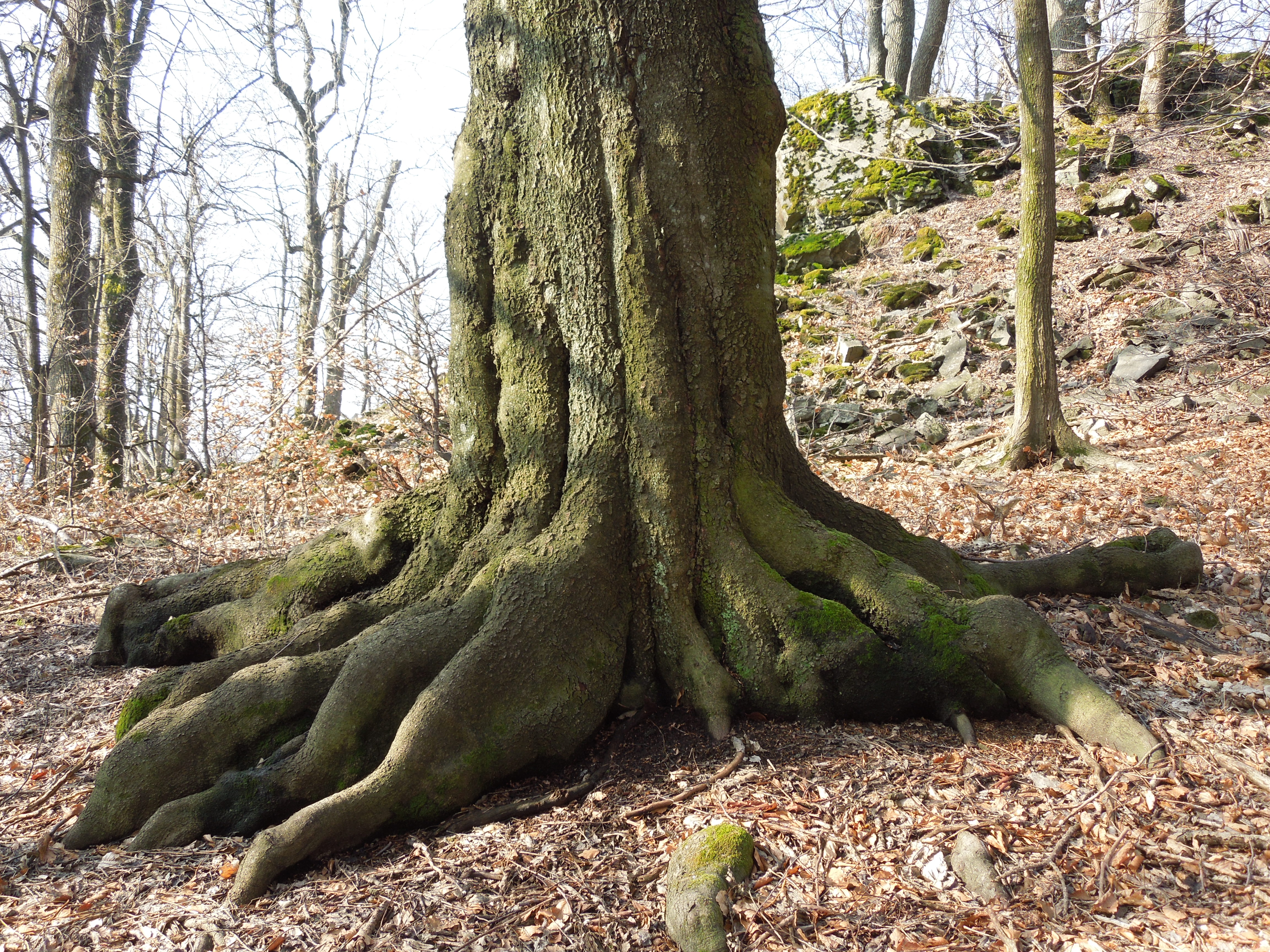 Kmeň starého stromu s obrovskými koreňmi v Kyjovskom pralese